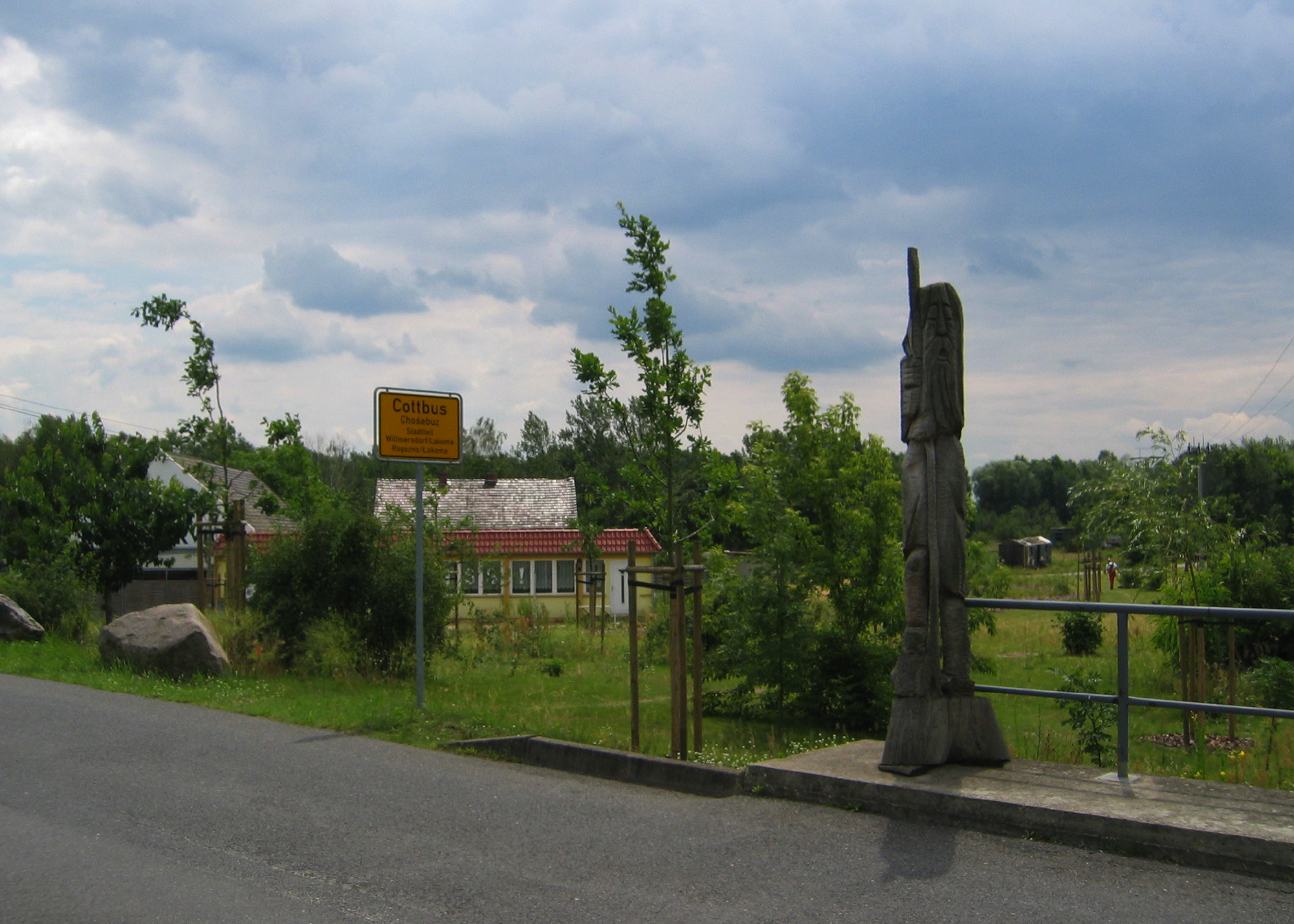 Ortseingang von Lakoma, Cottbus, Deutschland.